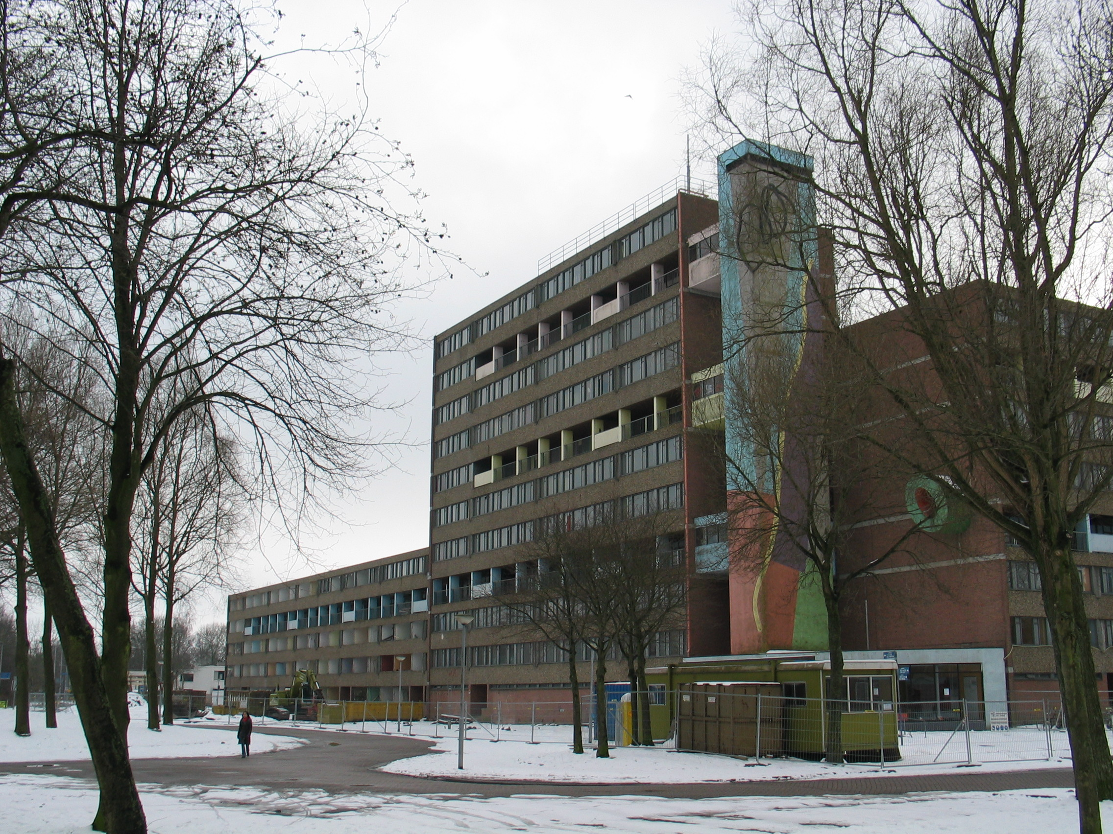 Kombuisflat in Lewenborg. Op de foto is te zien dat toen de foto gemaakt werd de sloop in het achterste, 4-etage tellende, gedeelte van de flat al was begonnen.